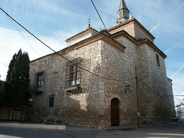 Iglesia Parroquial de San Juan Bautista de Ocaña (Toledo).